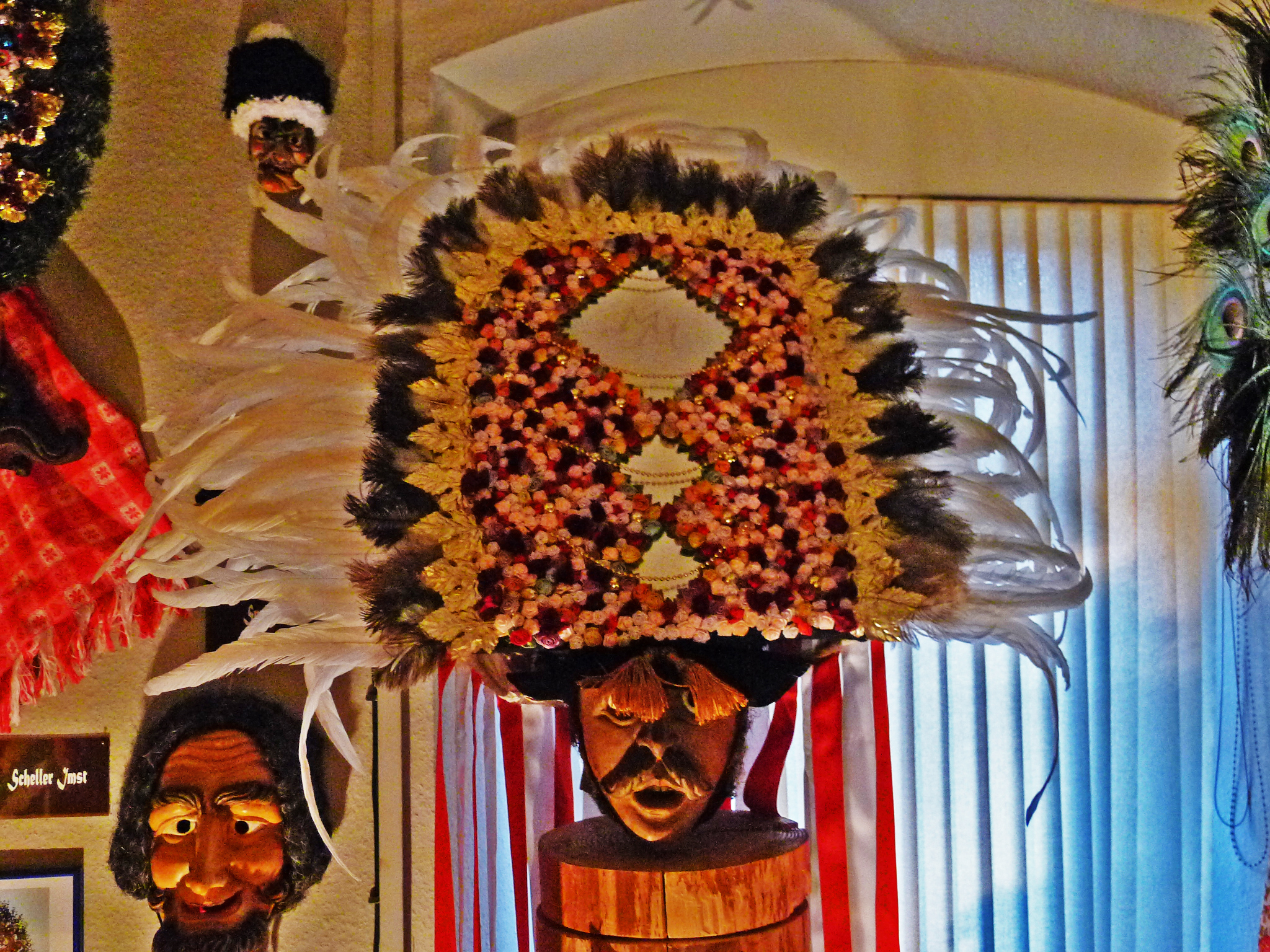 Spiegeltuxer, Figur des Mullerlaufens der MARTHA-Dörfer, hier in der Oberrheinischen Narrenschau Kenzingen ausgestellt